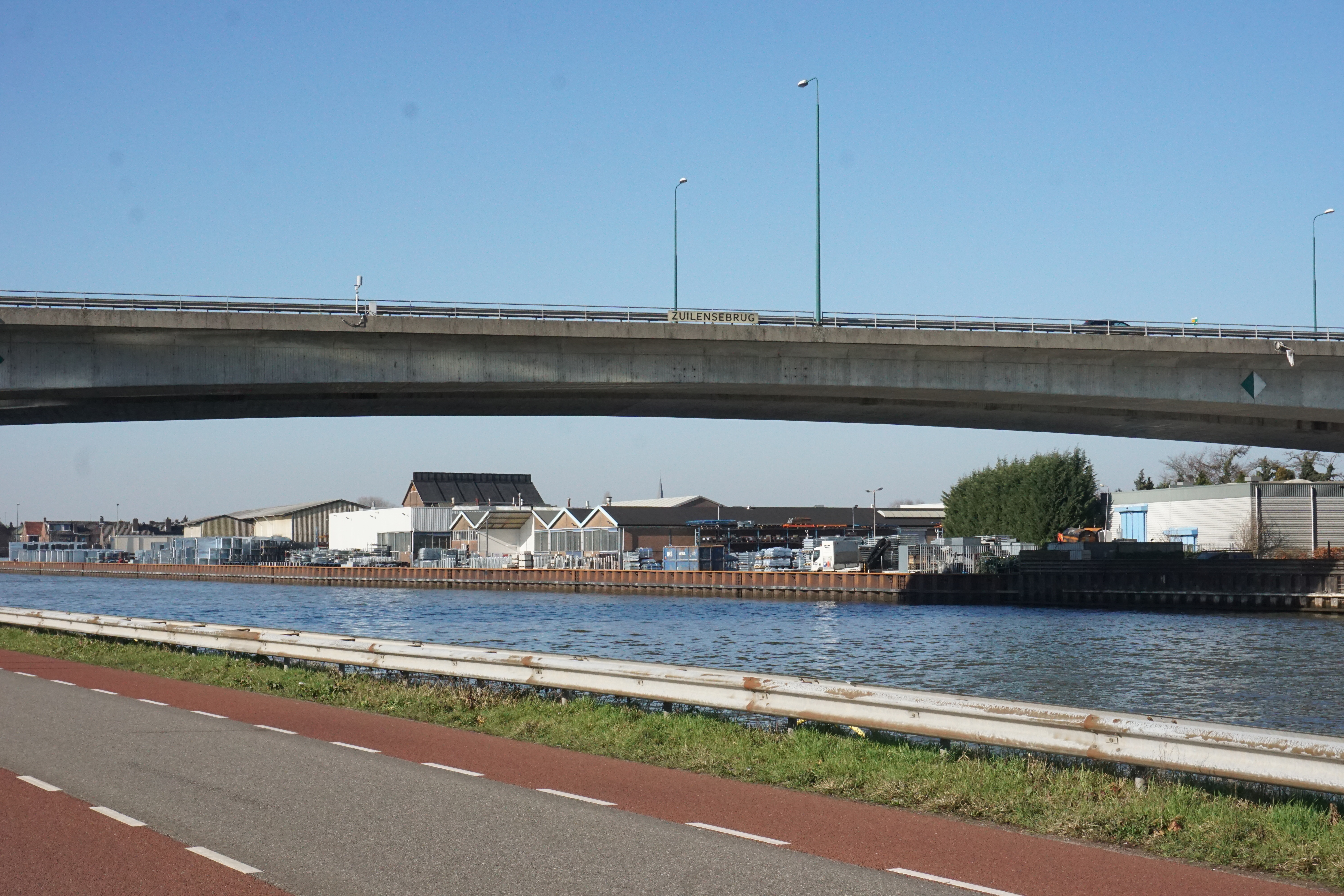 Brug over het Amsterdam-Rijnkanaal en de Utrechtse Vecht